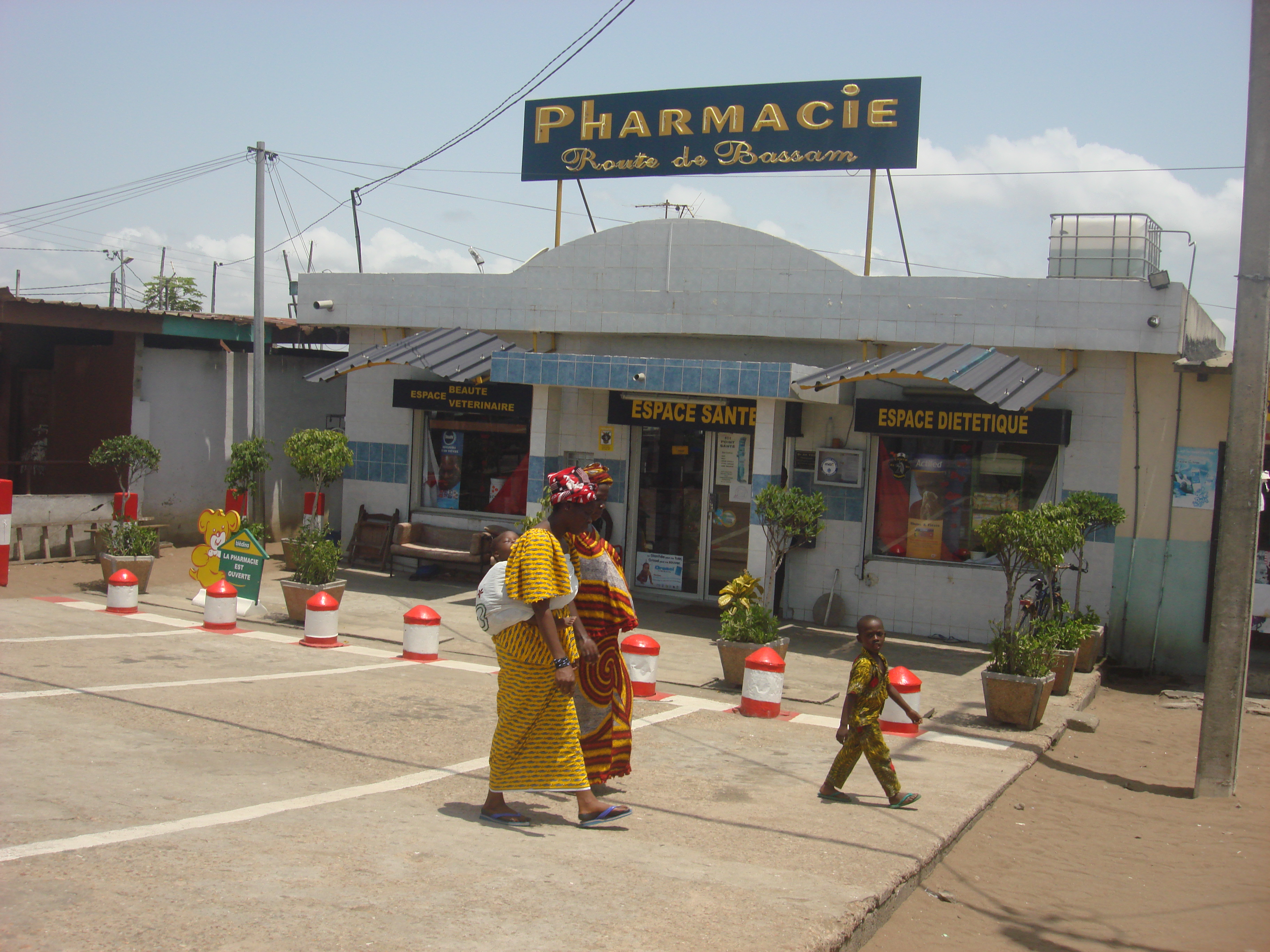 Officine de pharmacie privée à Abidjan, route de Bassam